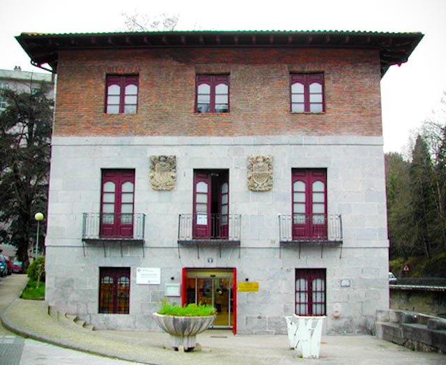 Casa Palacio de la familia Jausoro y posteriormente de Hurtado de Mendoza. Conserva una magnífica fachada barroca donde destacan los escudos familiares. Azcoitia (en euskera y oficialmente Azkoitia), provincia de Guipúzcoa, País Vasco (España).